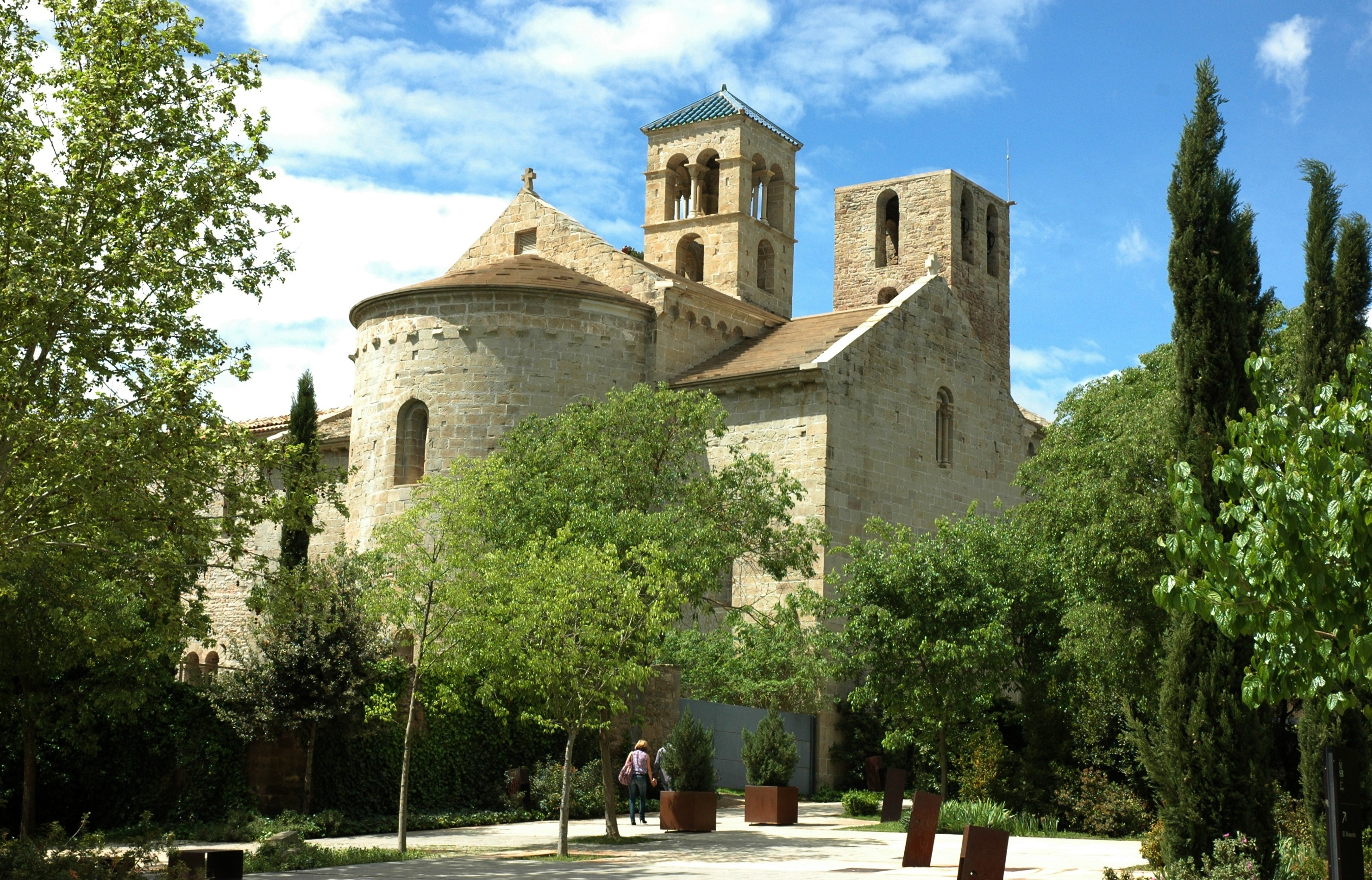 Sant Benet de Bages - General